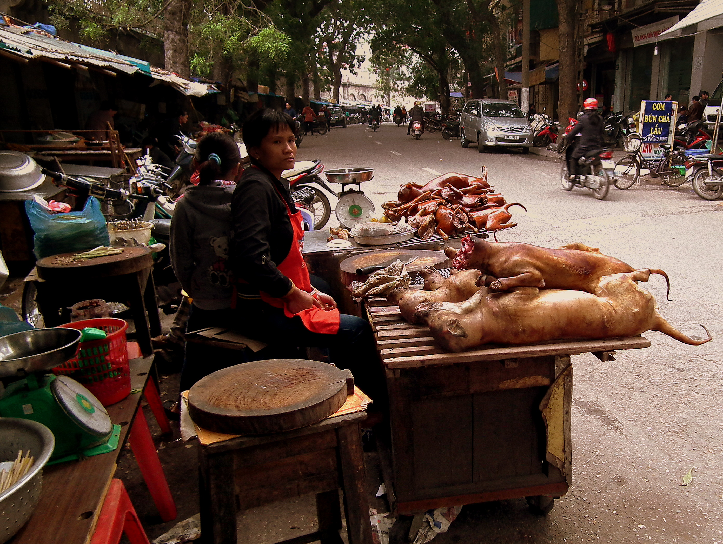 Dog meat is big business in vietnam.